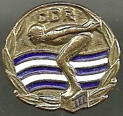 Schwimmabzeichen der DDR in der Stufe III